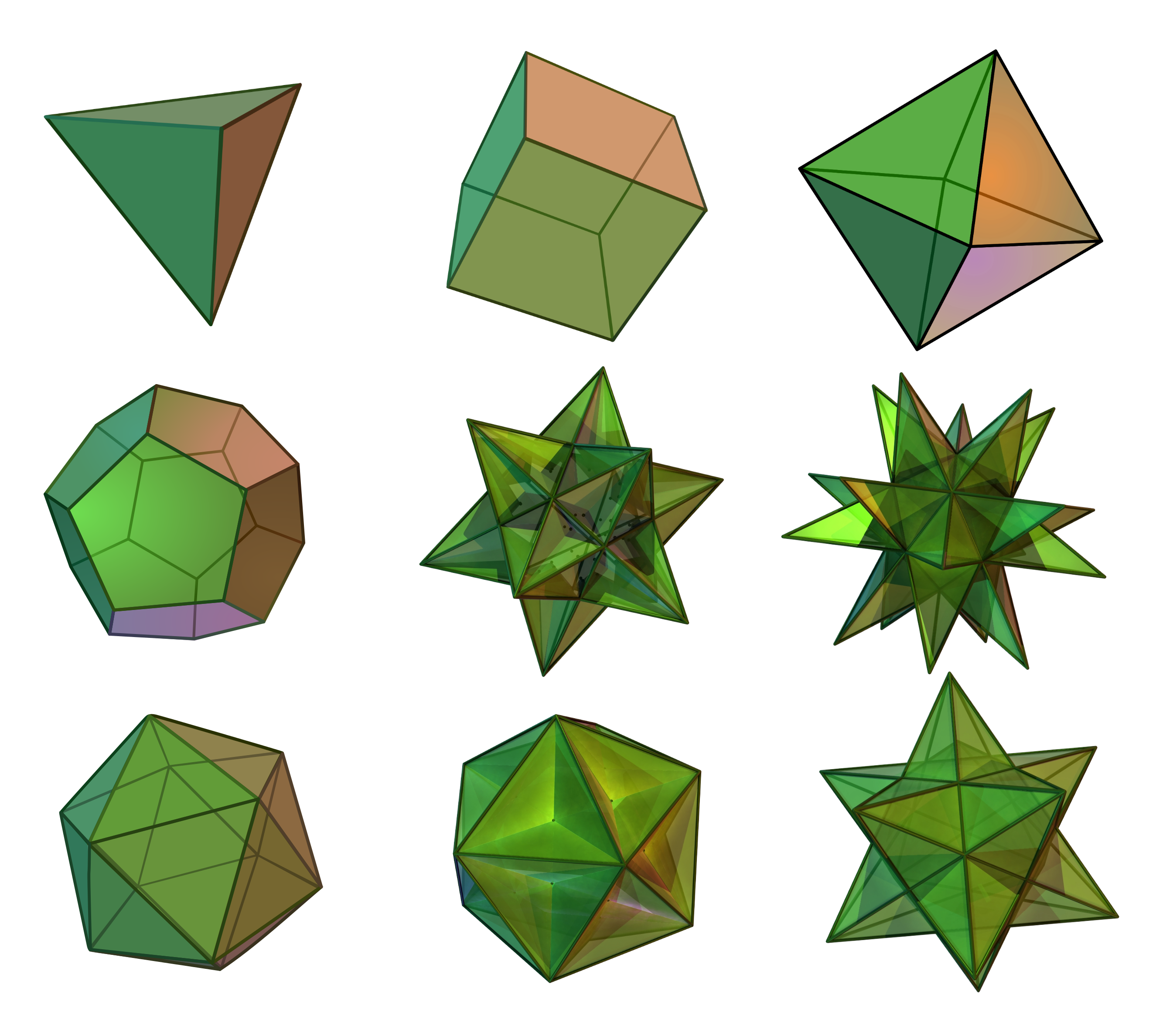 幾種正多面體